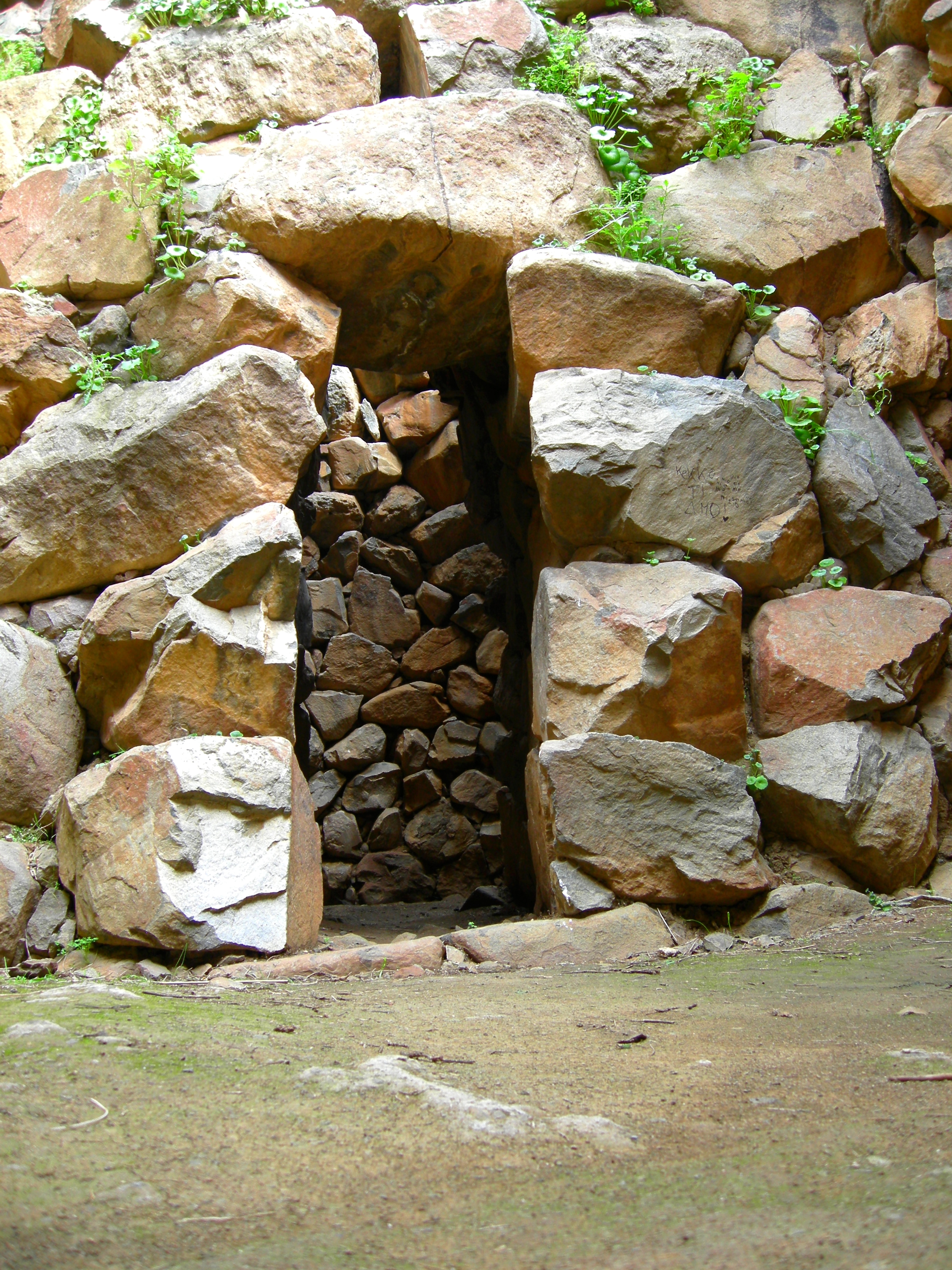 Nuraghe Sa Domu 'e S'Orku - MIBAC This is a photo of a monument which is part of cultural heritage of Italy.